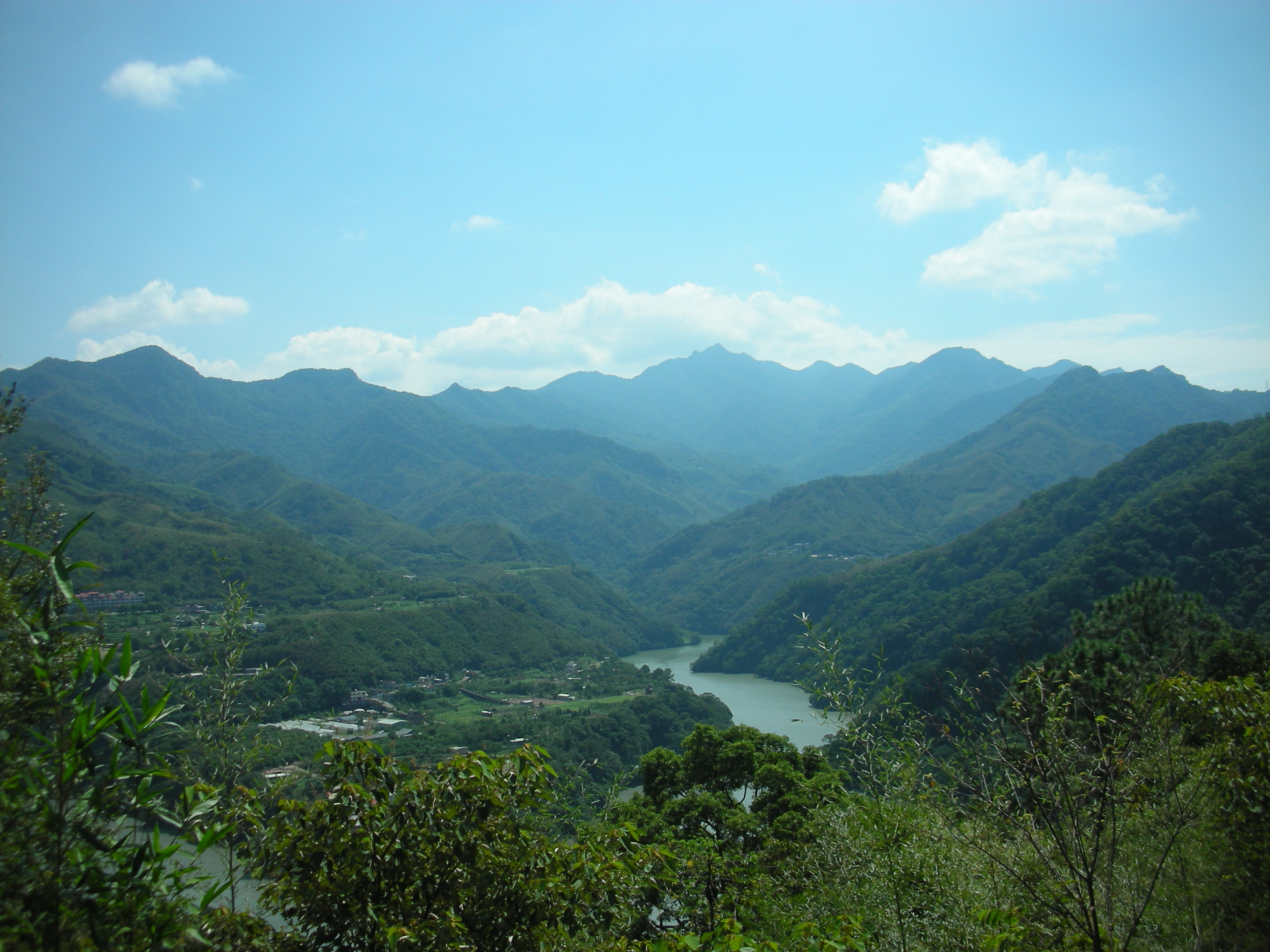 溪口台風光 Dahan River